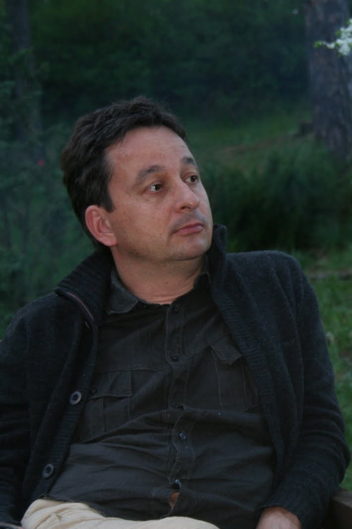 Margus Saar 15. mail 2010 Tomi-saate hooaja lõpetamisel.